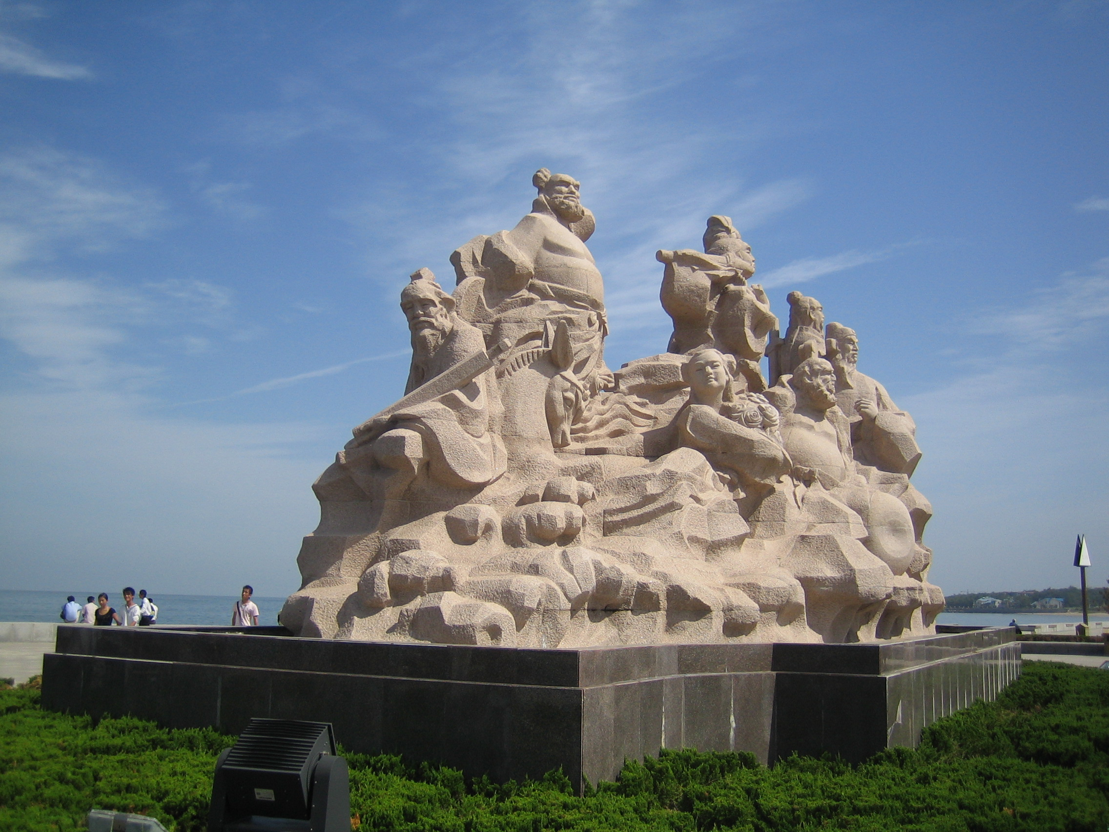 Penglai, Shandong, China